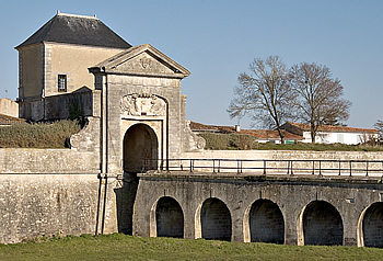 Porte de La Couarde, dite des Campani à Saint-Martin-de-Ré - Île de Ré Photo issue de la banque d'images : Pep.per 8 mars 2006 à 10:08 (CET)